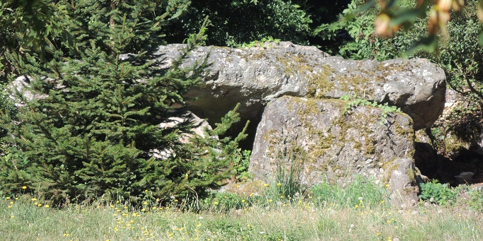 Dolmen de Sorel-Moussel vu de l'extérieur de la propriété privée, de profil avec une table de probablement plus de 3m de long et relativement plate et un orthostat lui aussi très régulier, parallélépipédique, à l'extrémité droite; un autre orthostat à sa gauche partiellement caché par un jeune sapin sur la gauche. Autre mégalithe(polissoir?) sans doute en arrière peu visible à droite